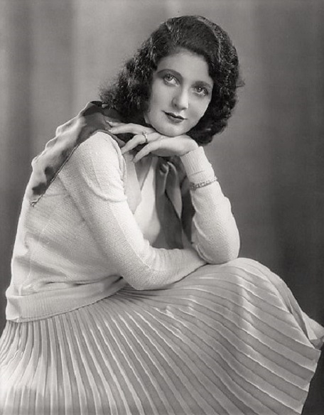 Merna Kennedy